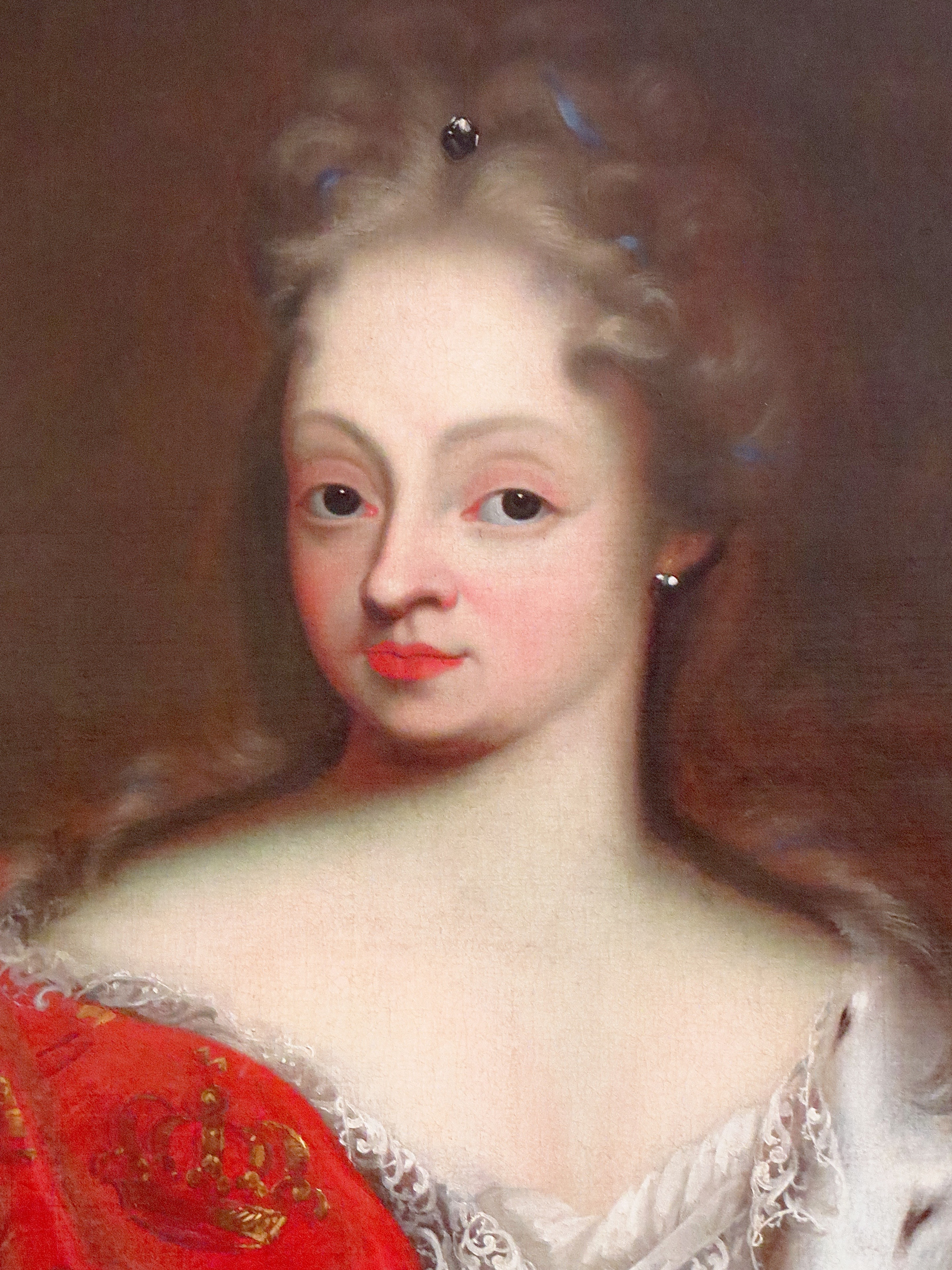 Louise af Mecklenburg-Güstrow (1667-1721), dronning af Danmark og Norge, Rosenborg Slot, København